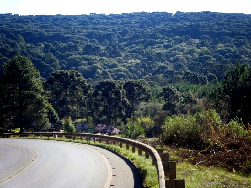 Reflorestamento de pinus eliottii e araucaria_angustifolia na Floresta Nacional de Caçador.